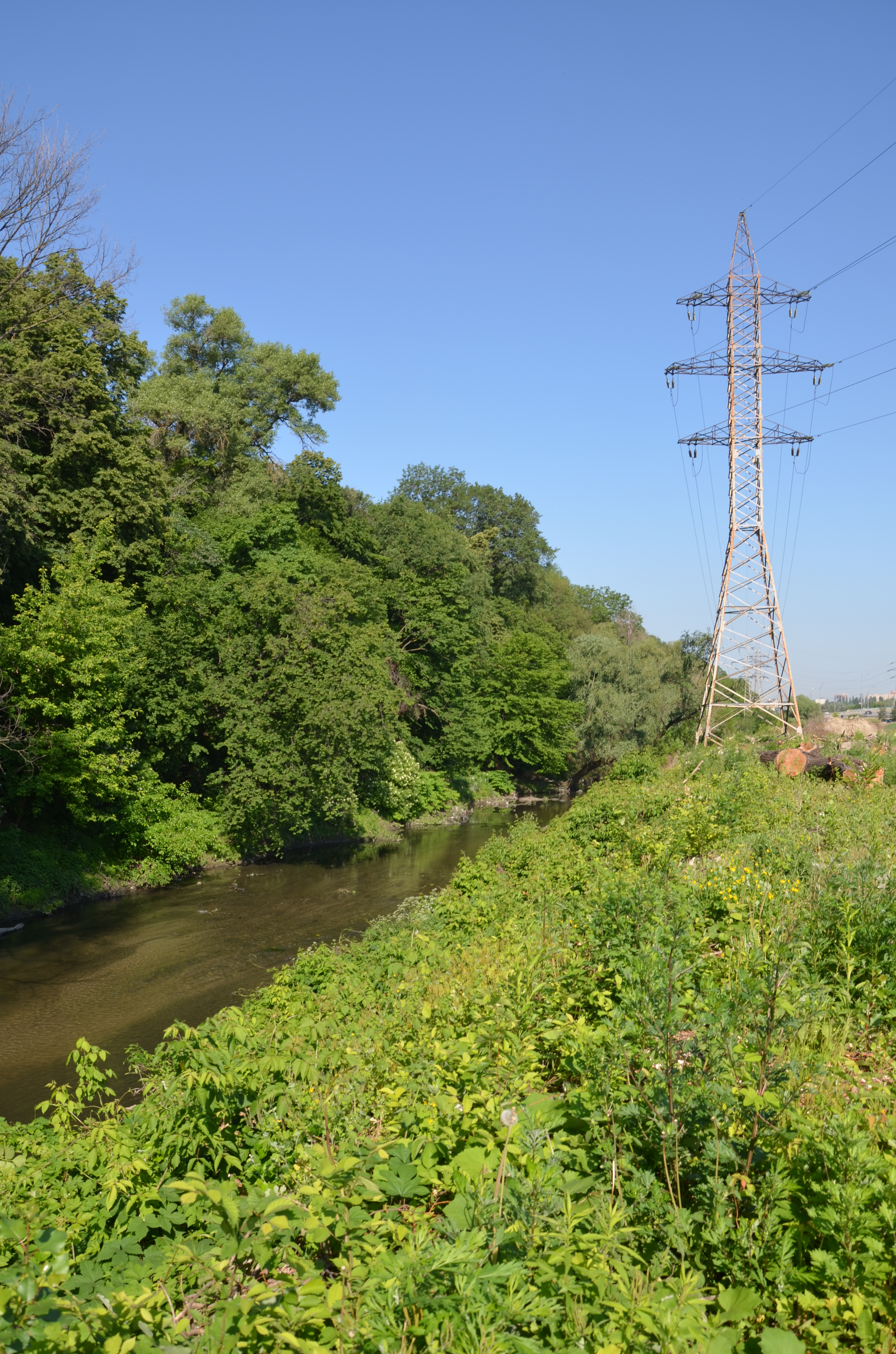 Природне русло р. Либідь, Голосіївський район, вул. Саперно-Слобідська (від колектора до Наддніпрянського шосе)